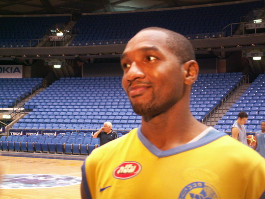 דרק שארפ צולם על-ידי אבי קדמי This picture was taken by Avi Kedmi